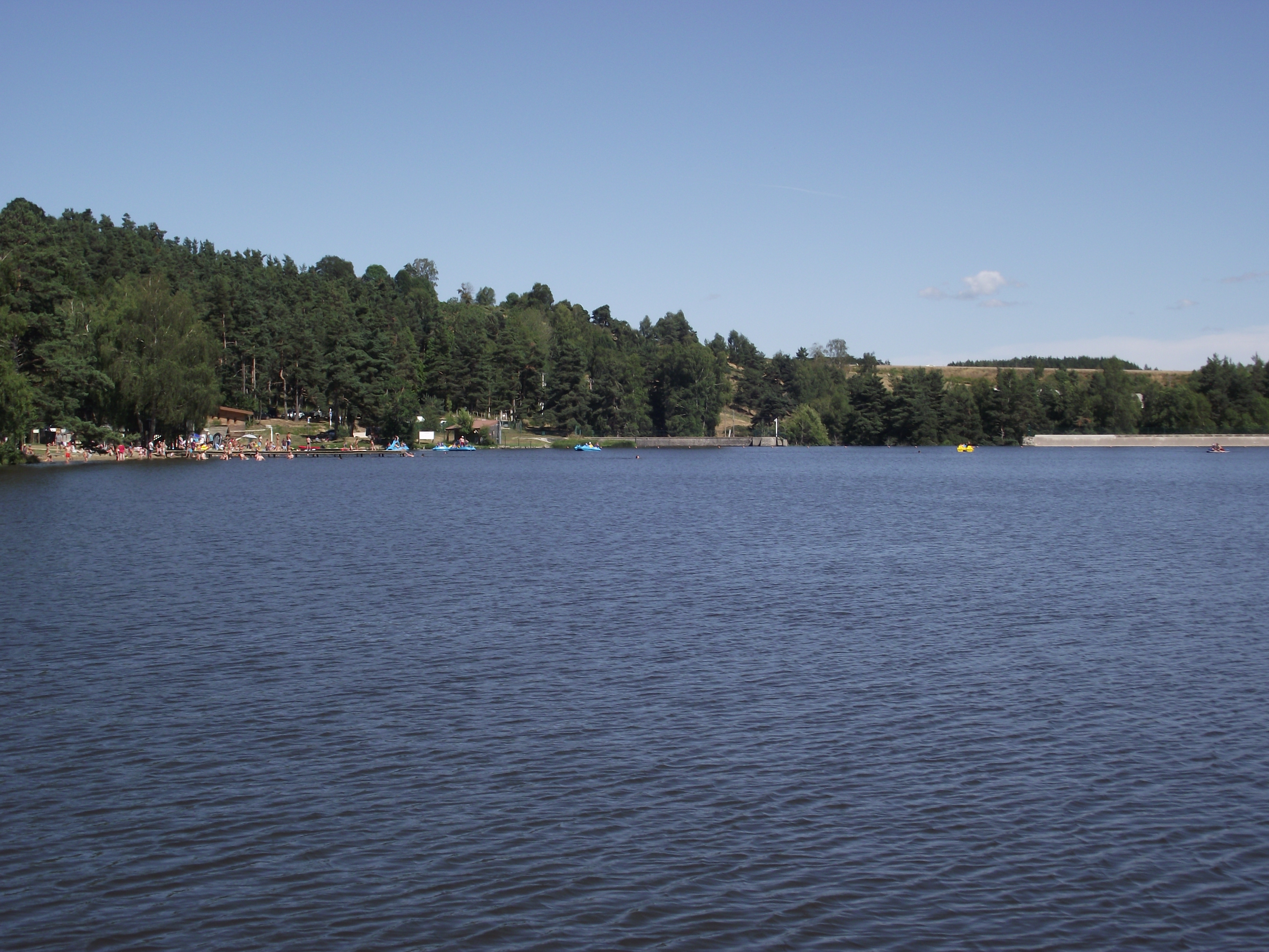 Le lac du Moulinet (Lozère) au nord de Marvejols.